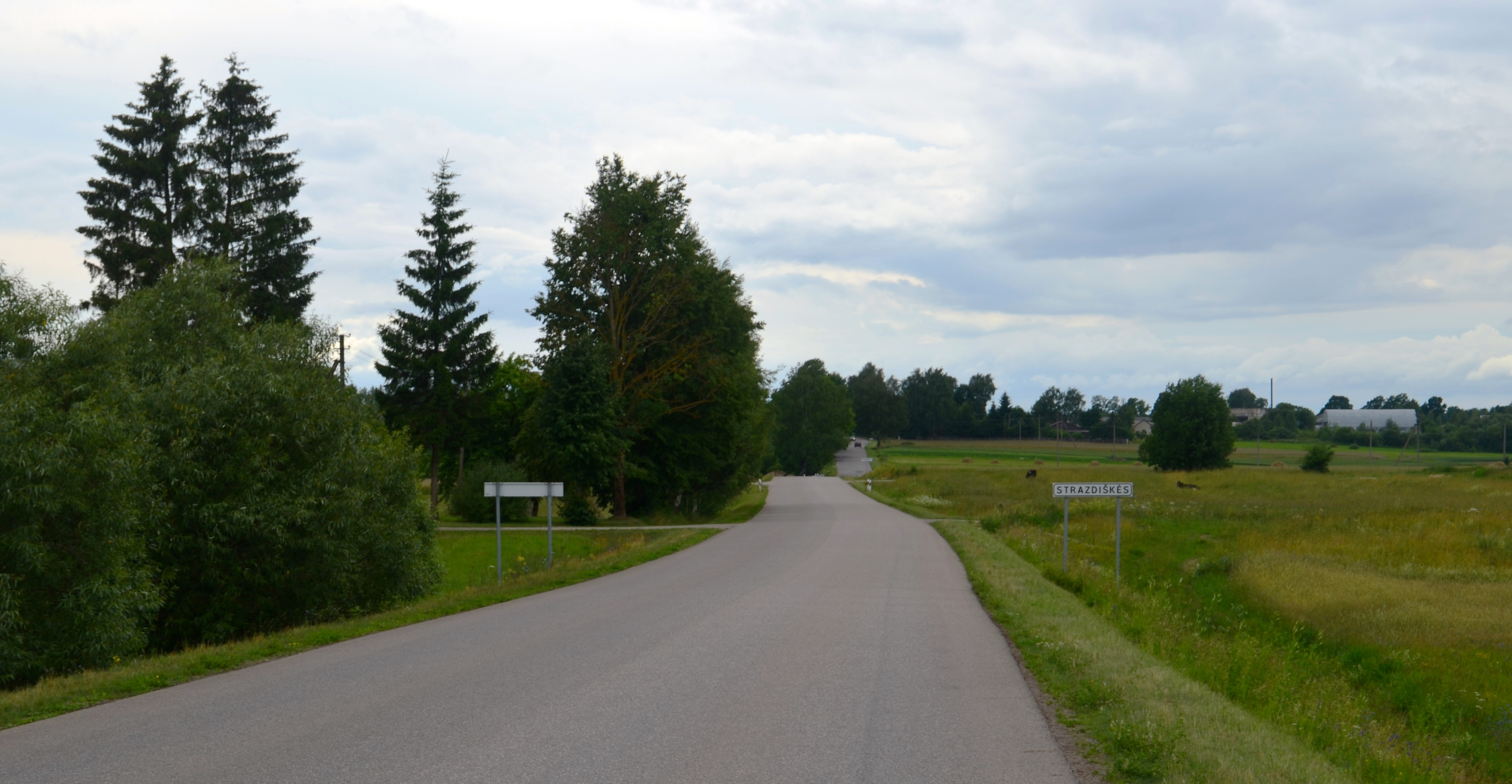 Strazdiškės, Prienų raj.